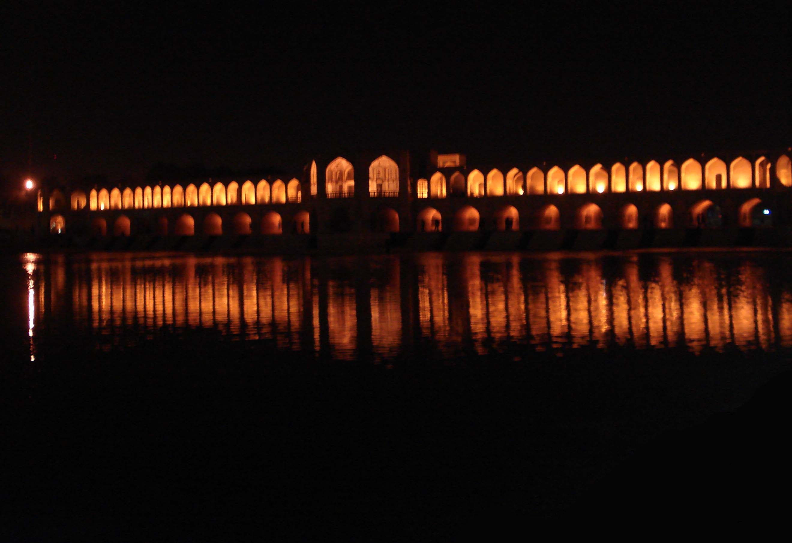 Khajoo bridge in Isfahan , Iran